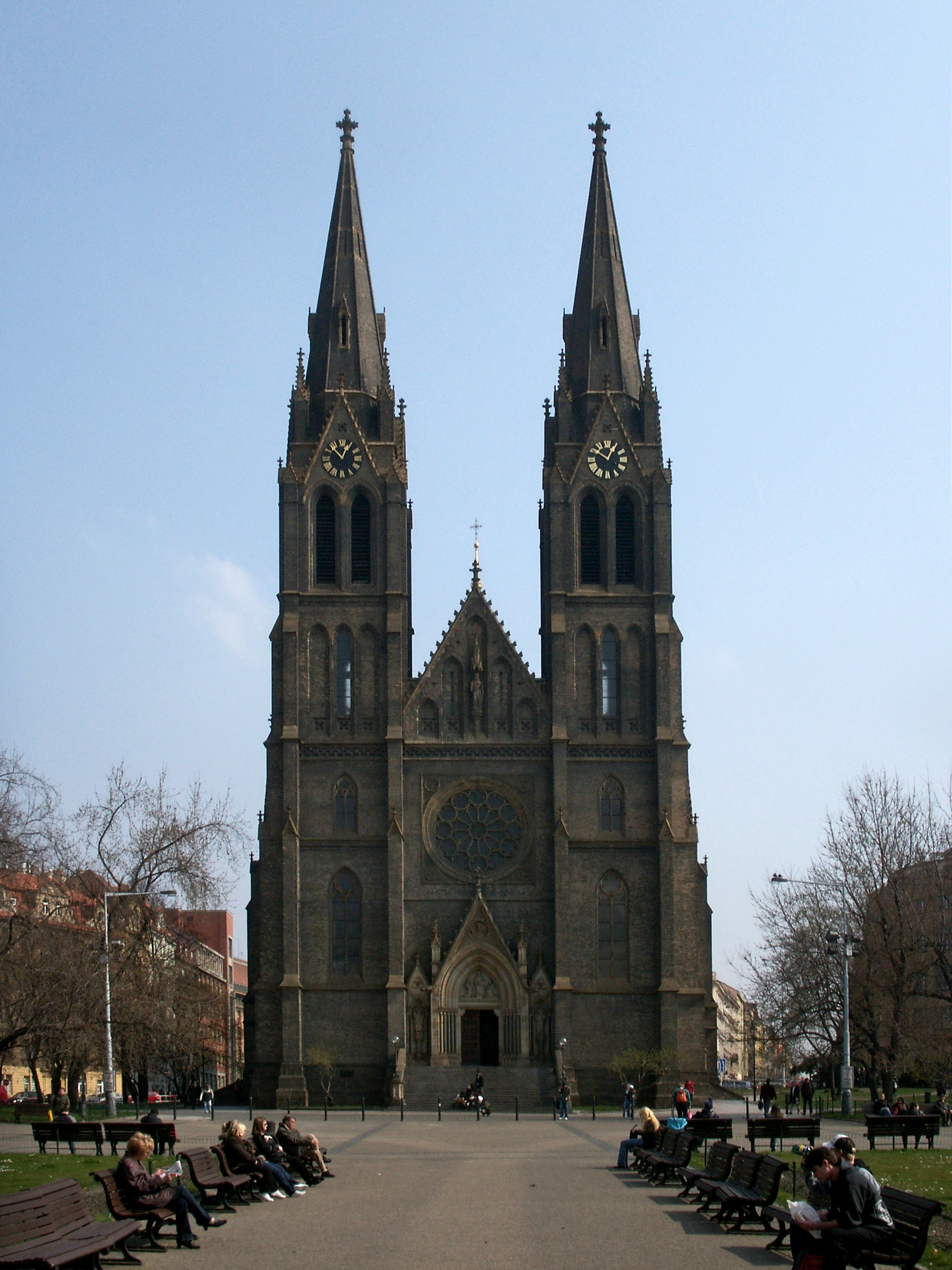 Kostel sv. Ludmily, Náměstí míru